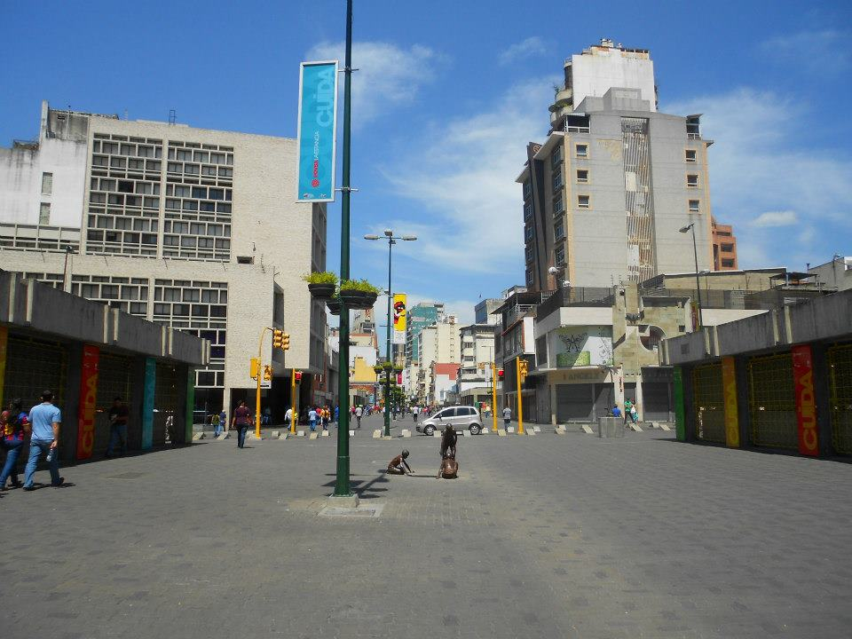 Sabana Grande, Caracas -. Venezuela